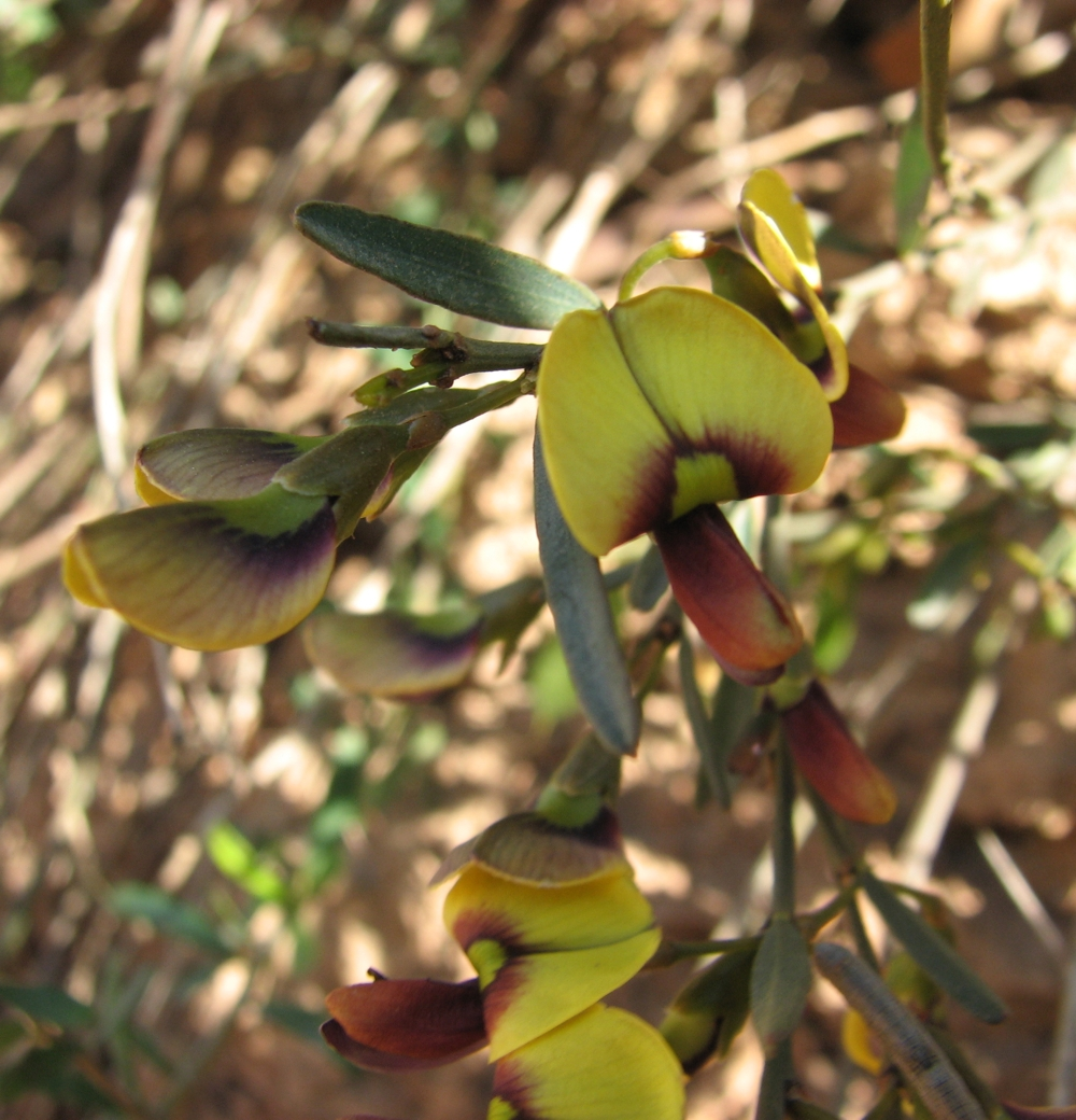 Templetonia stenophylla, Coimadai, Victoria, Australia